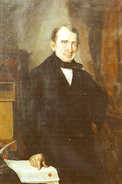 Franz Anton von Balling (1800-1875), german physician